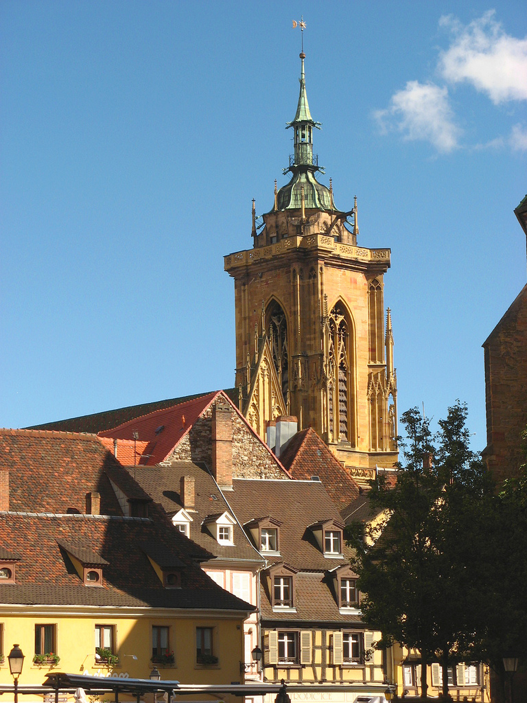 Colmar